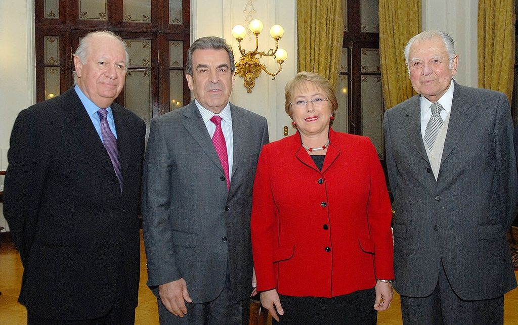 Los ex Presidentes de Chile Ricardo Lagos, Eduardo Frei Ruiz-Tagle, Patricio Aylwin y Michelle Bachelet, reunidos en el aniversario de la Democracia Cristiana.